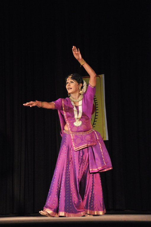 ശോവന നാരായൺ കൊല്ലത്ത് 24 സെപ്റ്റംബർ 2012